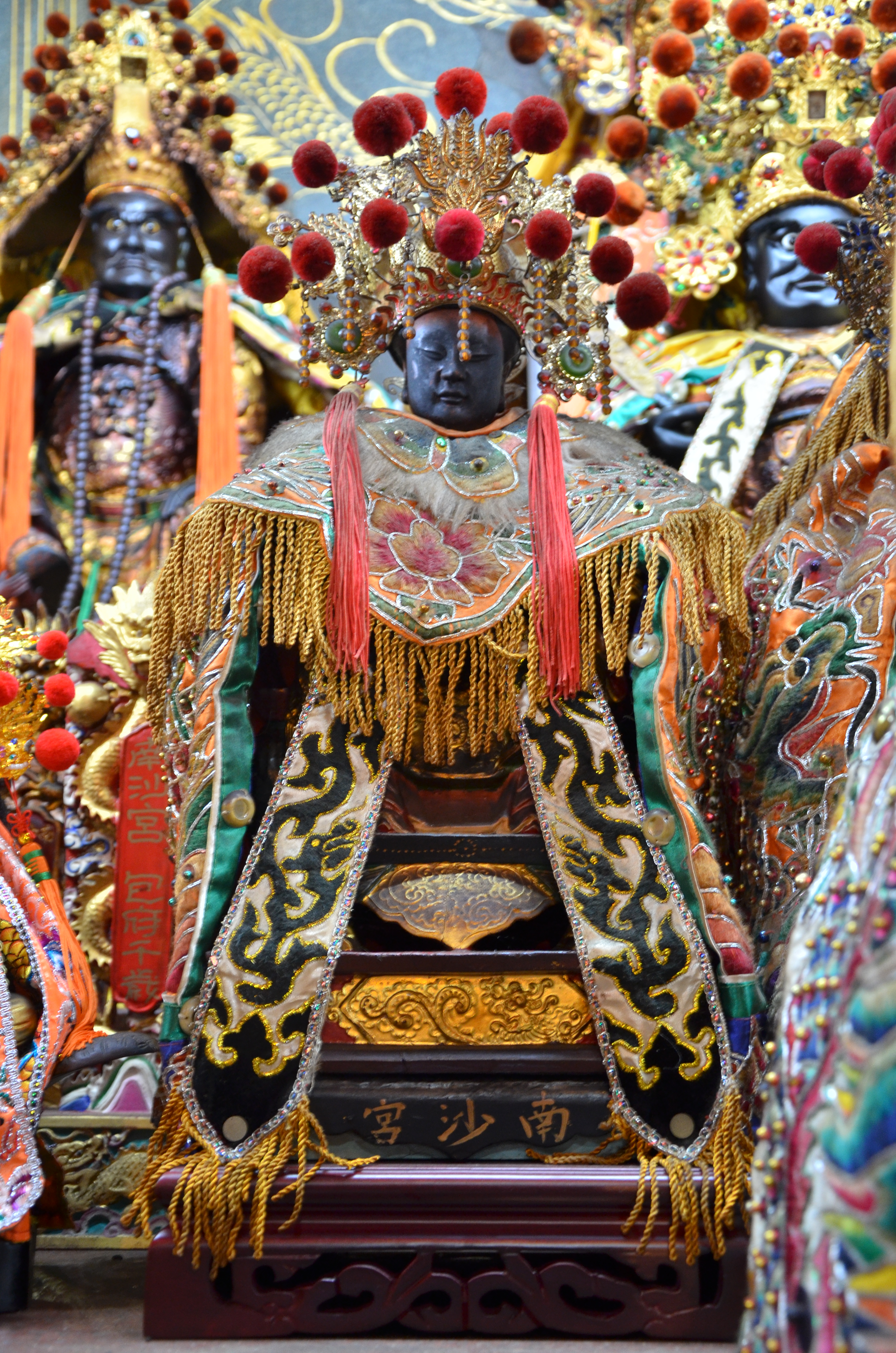 南沙宮黃府夫人